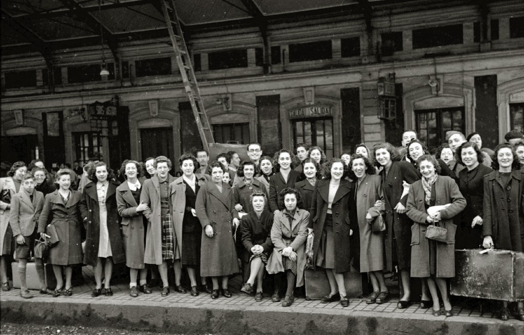 Título original: Integrantes del Orfeón Donostiarra en la estación del Norte con destino a Murcia (3/4) Localización: San Sebastián (Guipúzcoa)